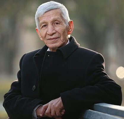 Oʻzbekcha/ўзбекча: Anvar Obidjon